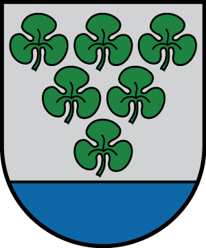 Kategorija:Kārsavas novads Kategorija:Latvijas novadu ģerboņi